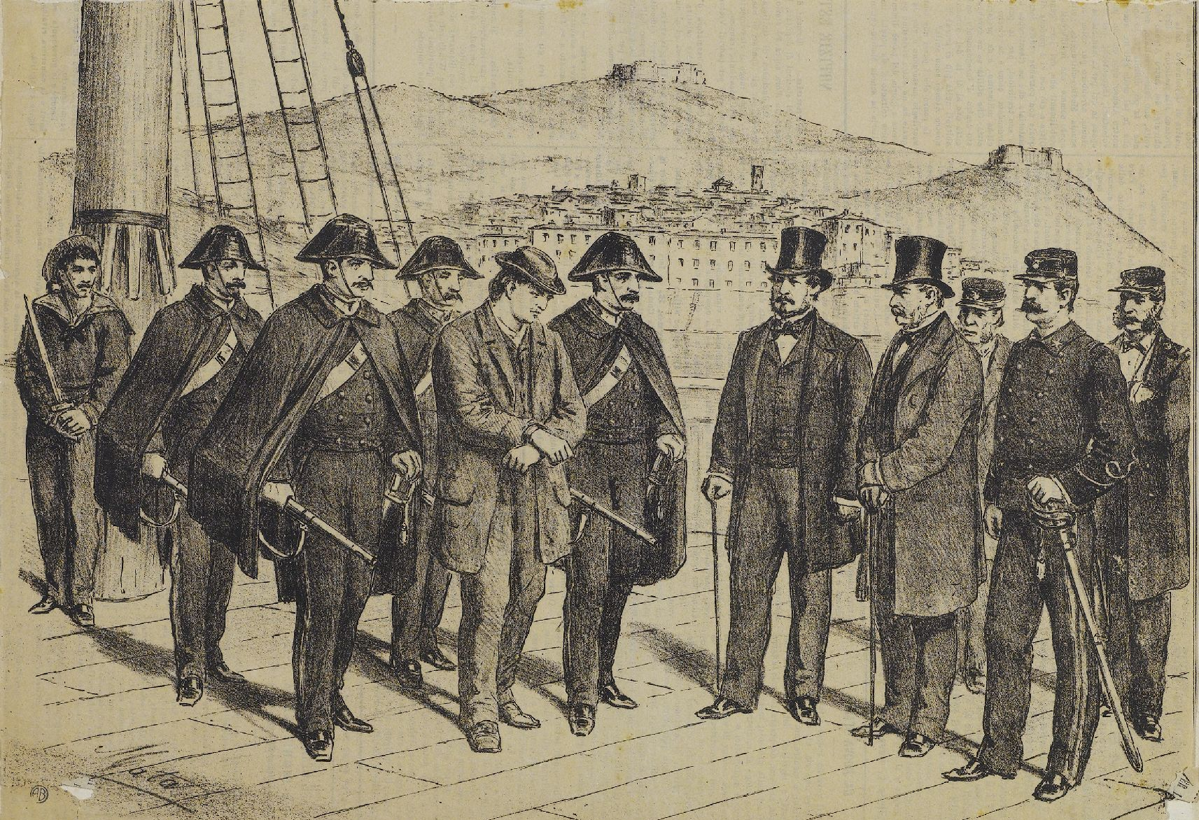 L'anarchico Giovanni Passannante giunto a Portoferraio per essere tradotto all'ergastolo della Linguella. Immagine contenuta nella Raccolta Stampe Bertarelli del Castello Sforzesco di Milano